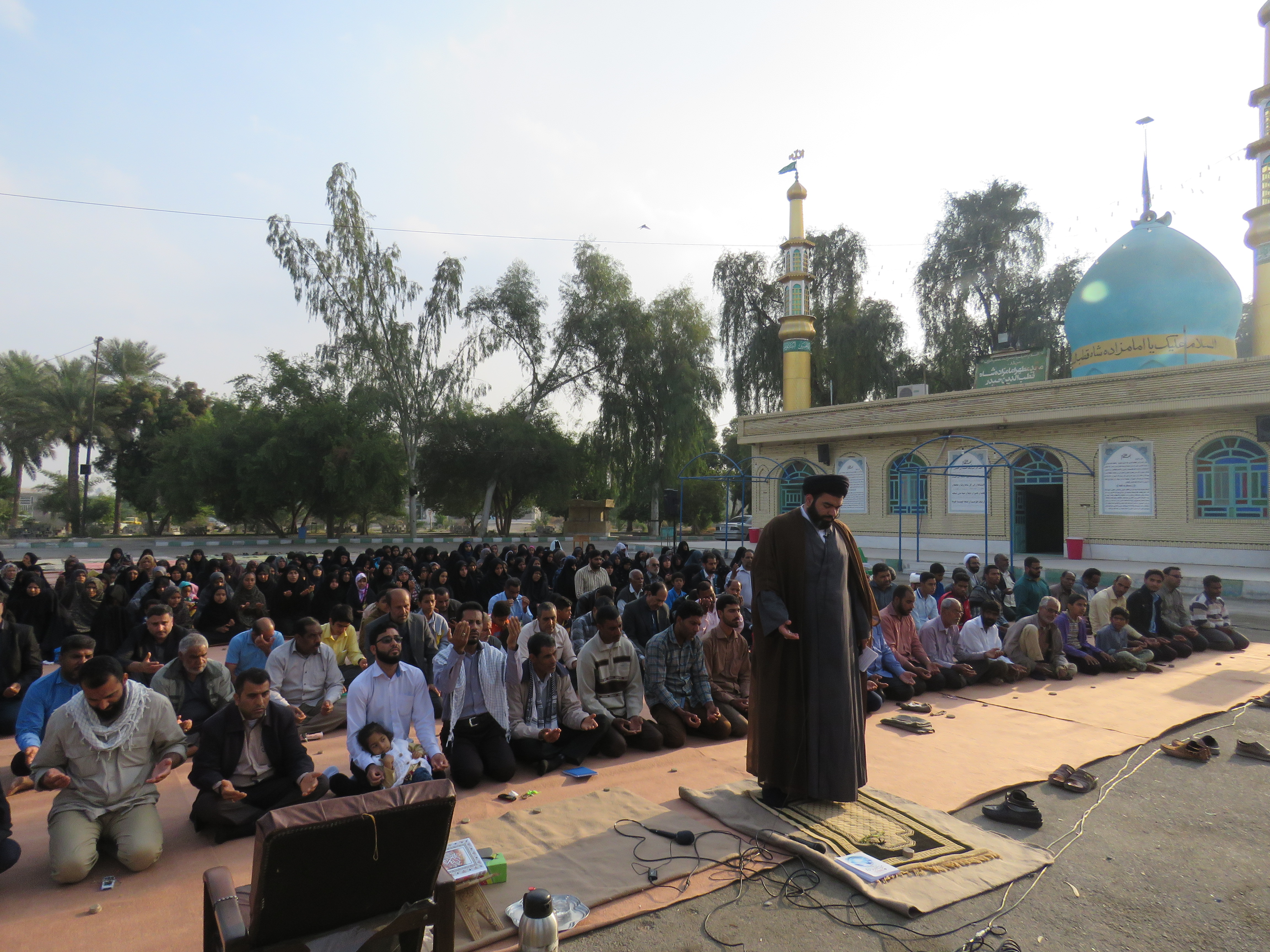 دعای روز عرفه - آستان مقدس امامزاده شاه قطب الدین حیدر(ع) رودان